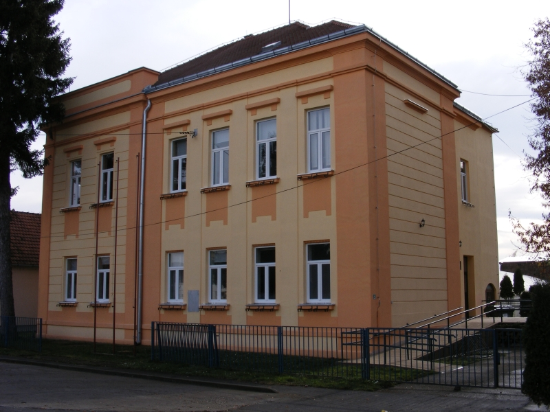 Srednja škola u Dalju